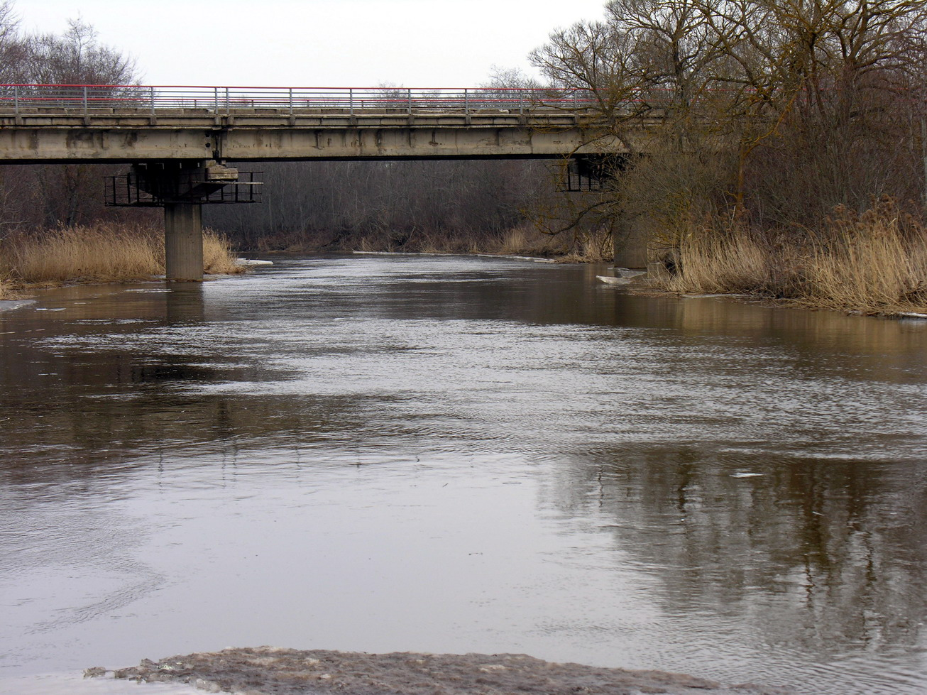 Tiltas per Virvytę ties Pavirvytės k., Viekšnių sen. Foto: Algirdas, 2006 m. balandžio 9 d.